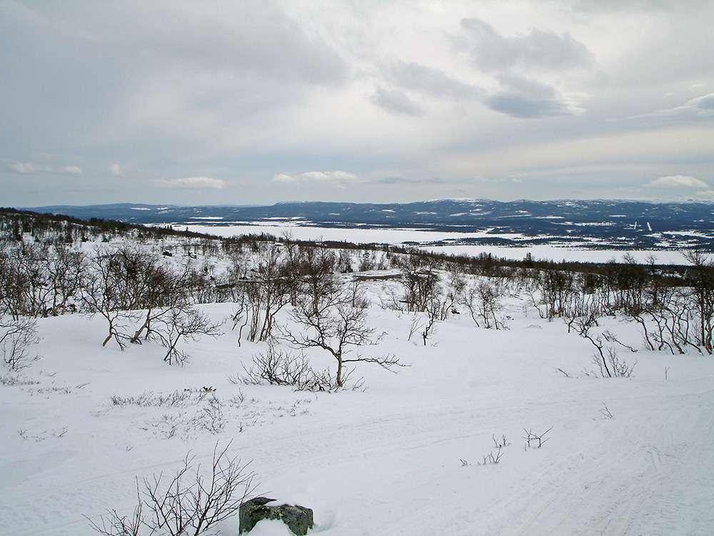 Utsikt över Östra Marssjön (till vänster) och Västra Marssjön (till höger) från norr (Marsfjällsmassivet).